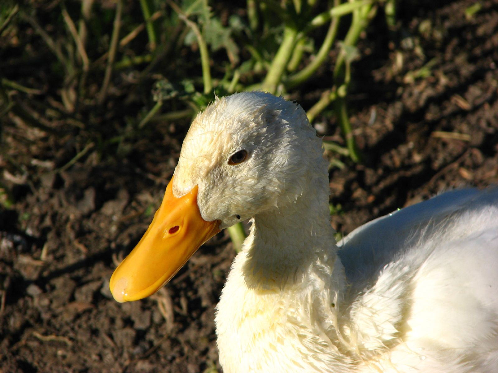 Portrait